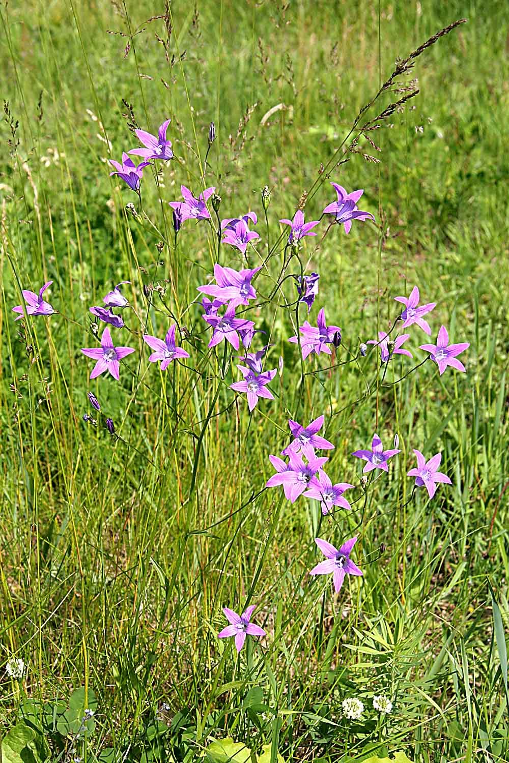 Campanula_patula Czech republic near Pardubice Autor Prazak